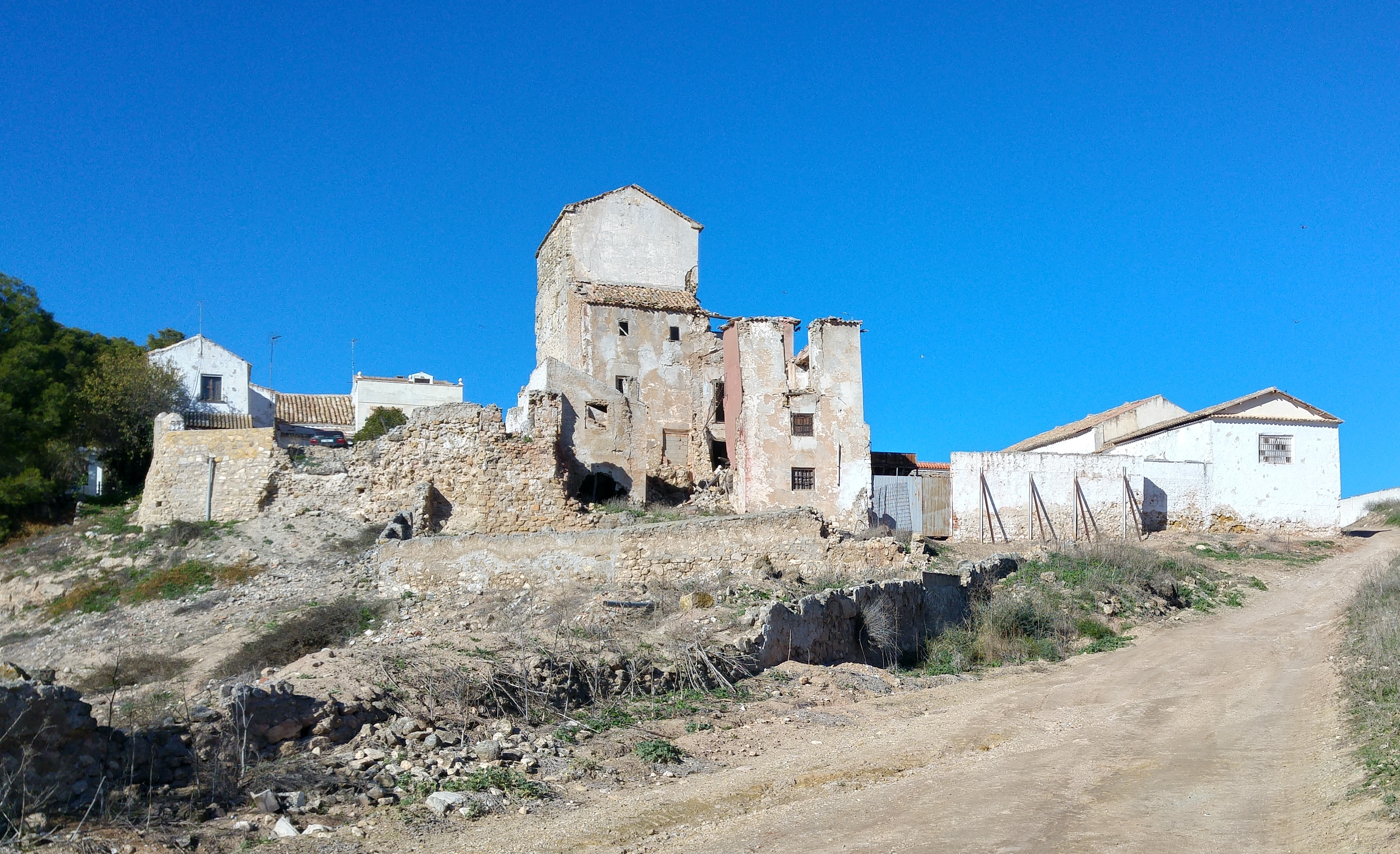 Vista de la aldea de El Término.